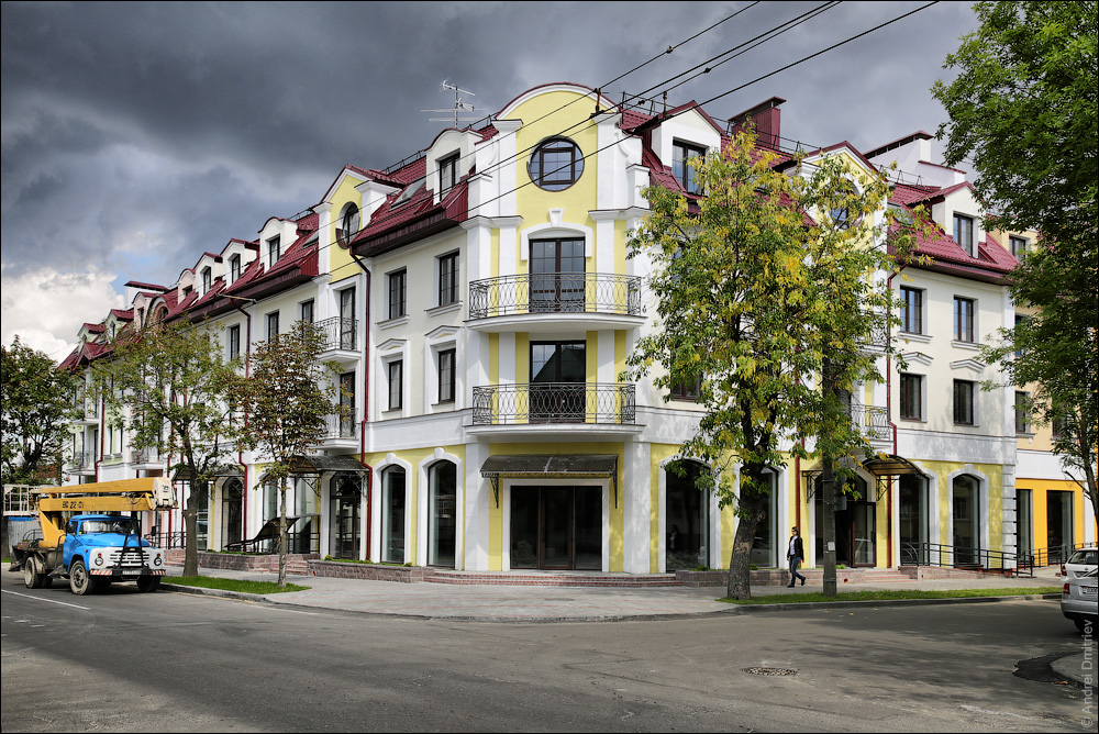 Брэст. Замалёўкі